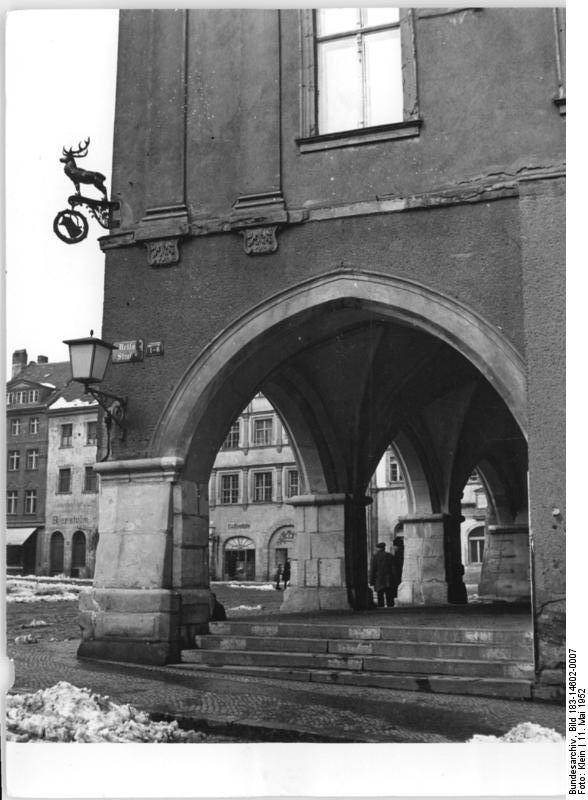 Görlitz, Untermarkt, Laubengang Zentralbild Klein Stra.-Be. 11.5.52 Stadtbilder aus Görlitz. Durch die Unterstützung unserer Regierung werden die alten Kulturbauten der Stadt Görlitz erhalten und instandgesetzt. UBz: Die wieder instandgesetzten Laubengänge am Untermarkt.